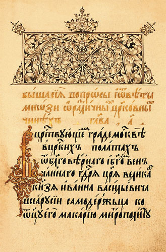 "Стоглав". 1551 г. Титульный лист.